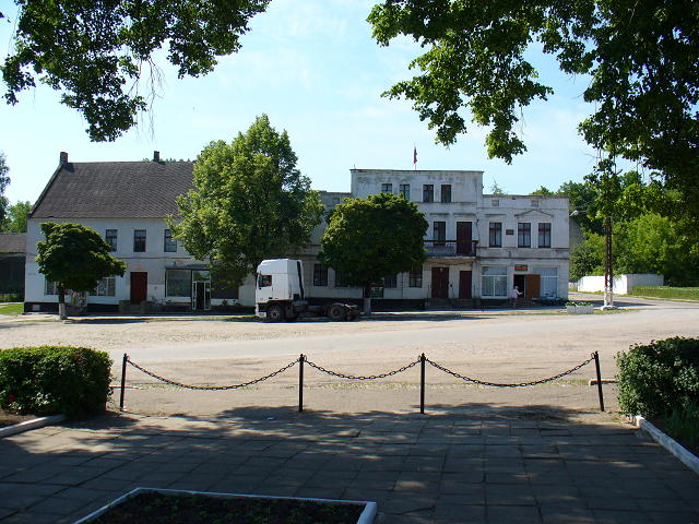 restliche Altbebauung am Markt in Pillkallen